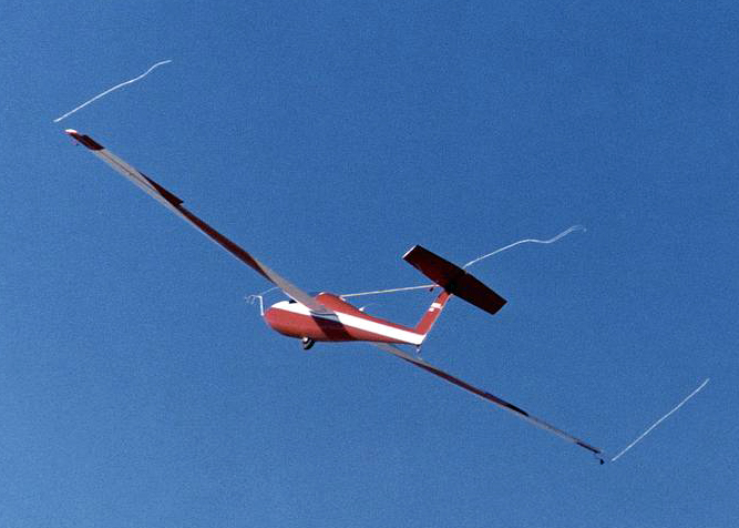 Segelflugzeug Schweizer 1-36 im Fluge: Kontrollierter Sackflug, die Luftströmung durch Fäden sichtbar gemacht